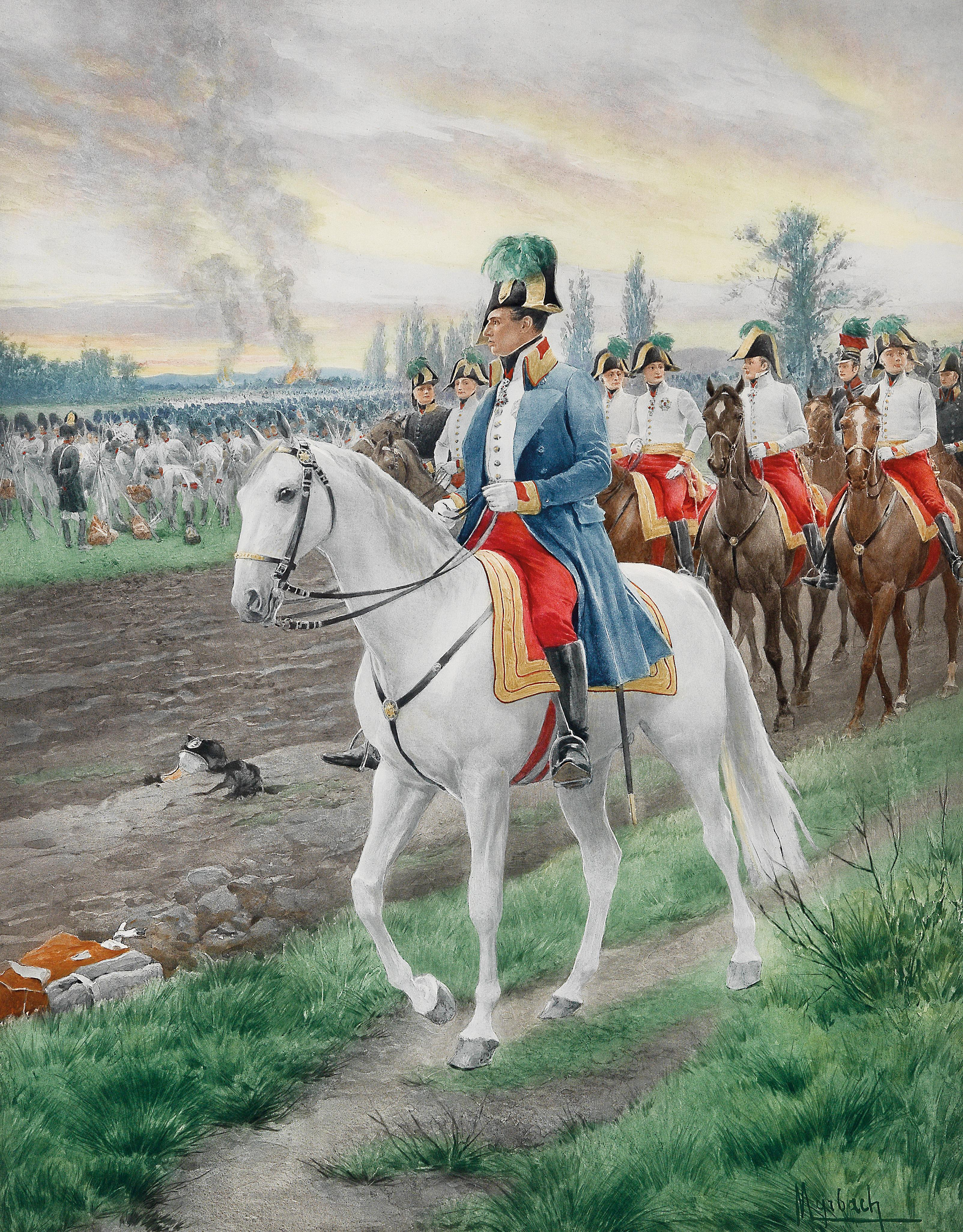 Erzherzog Karl mit seinem Stab. Farbdruck von Felician Myrbach, 60 x 47 cm, eigenhändigt signiert "Myrbach"